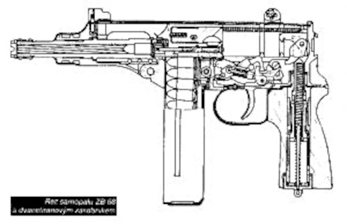 obyčajna legalna technicka krezba